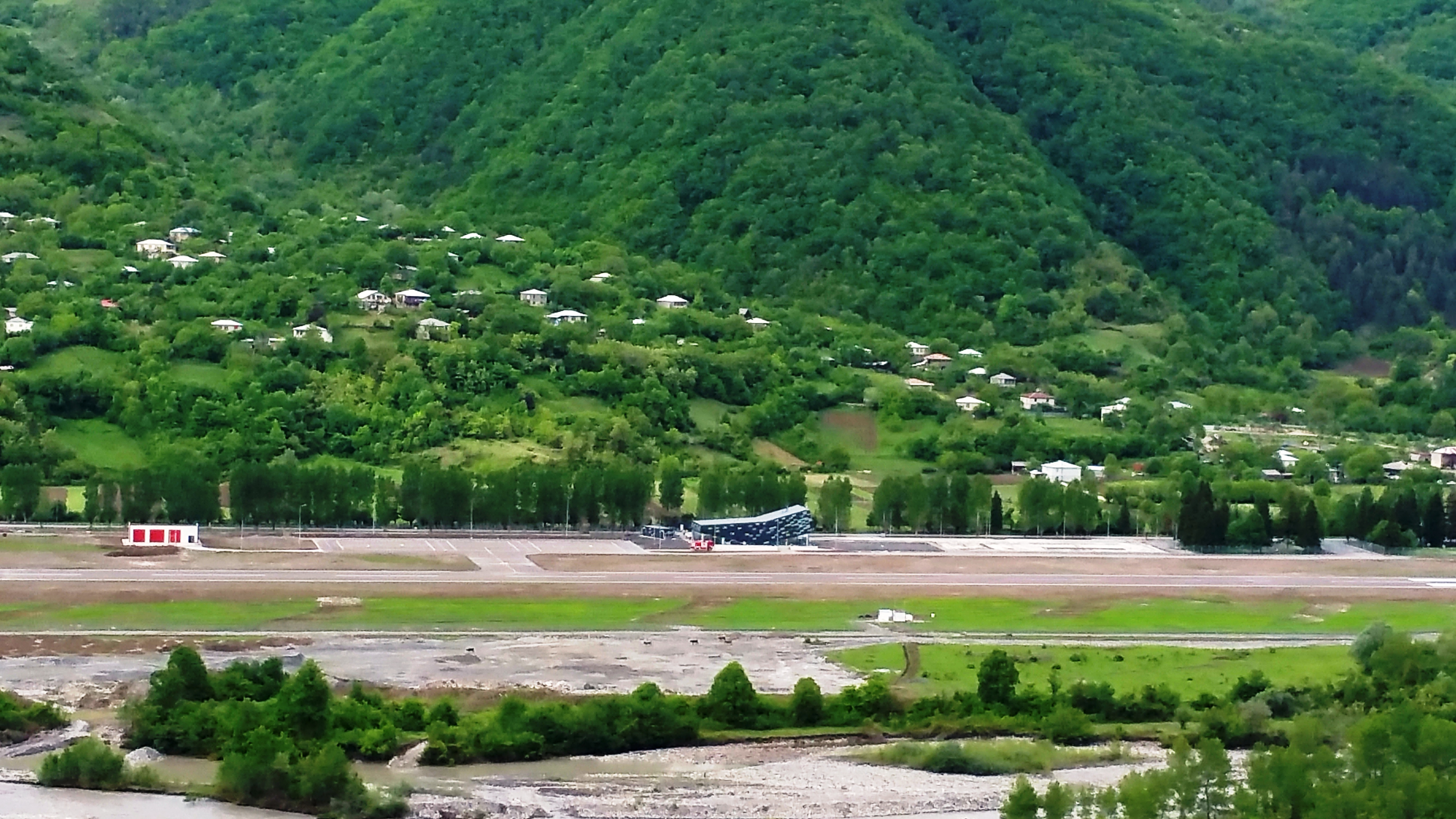 ამბროლაურის აეროპორტი